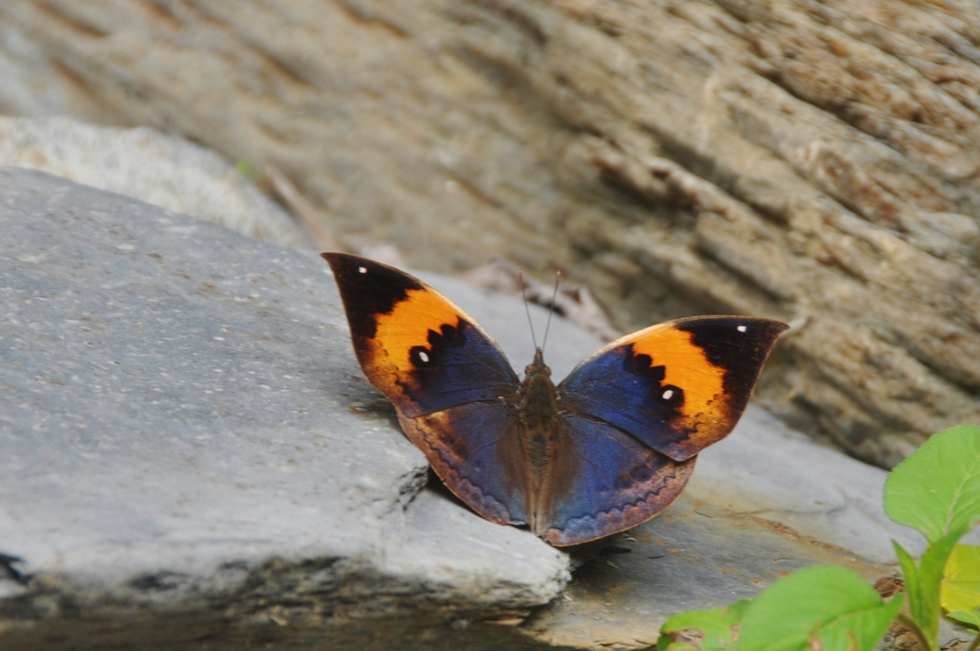 306枯葉蝶8(李榮芳攝)